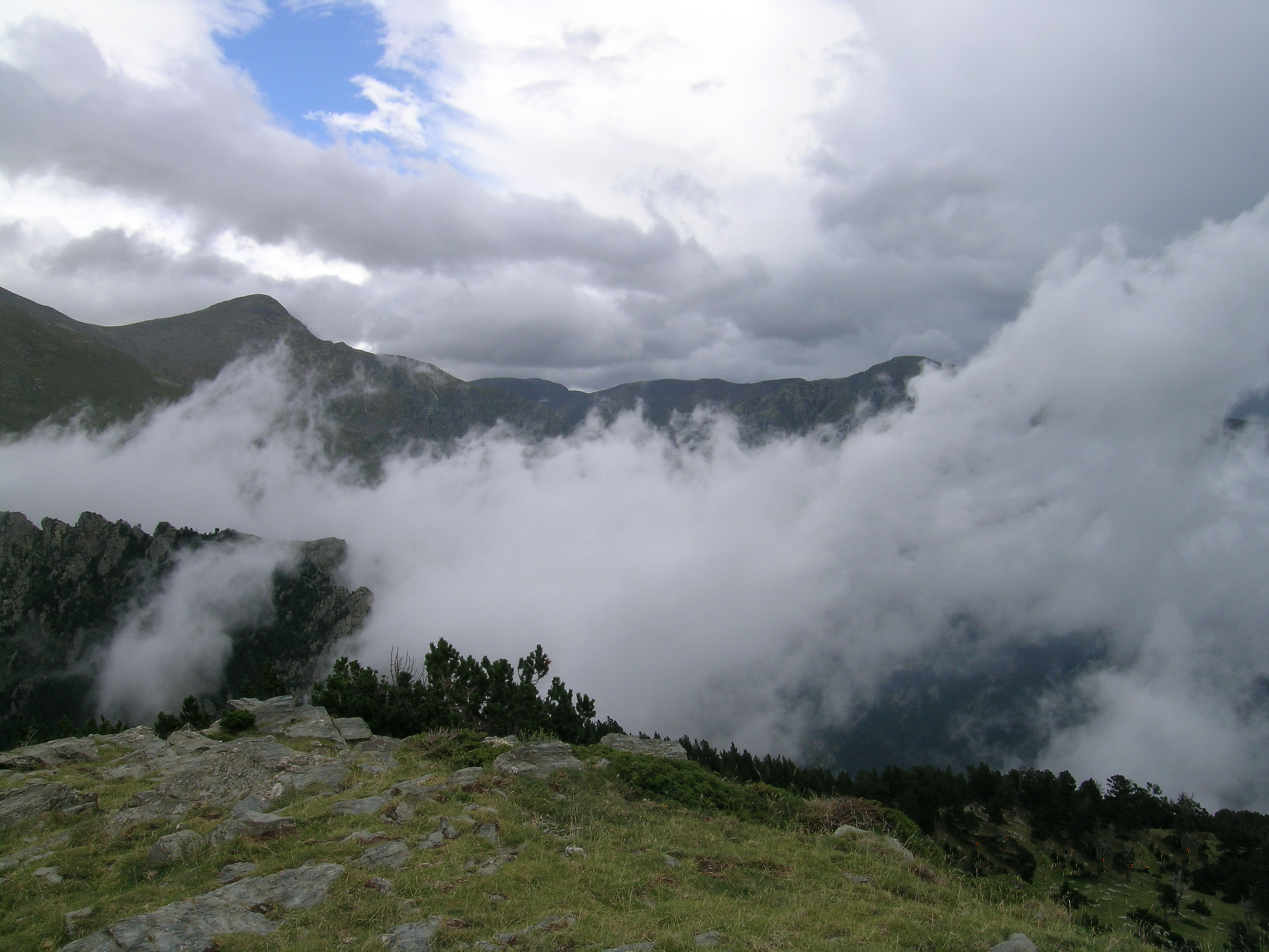 Vistes des de Fontalba